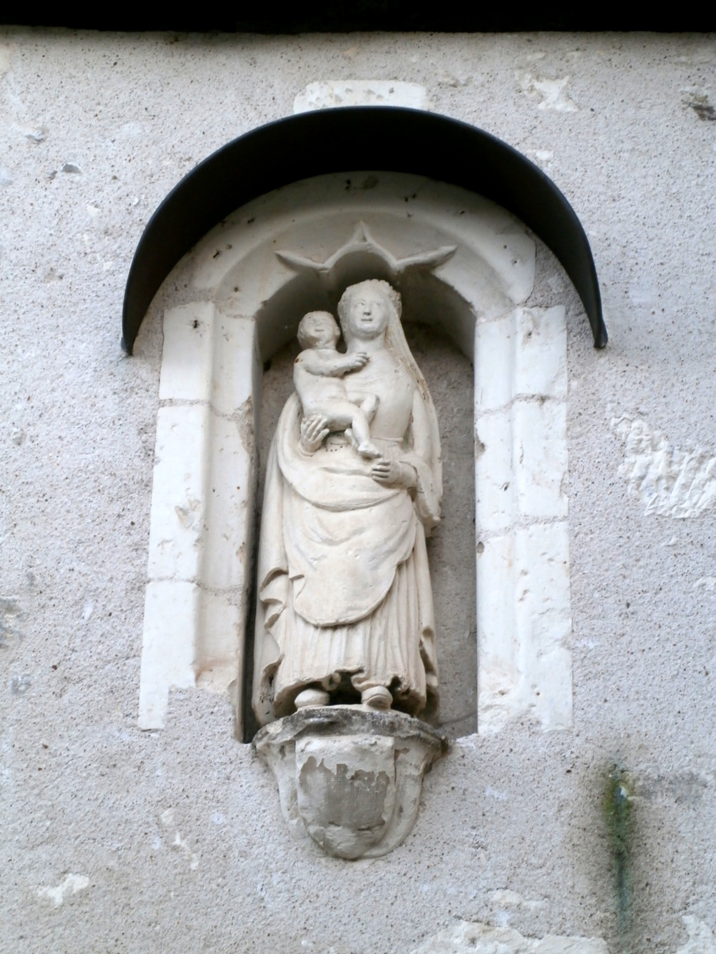 La statue de la Vierge à l'enfant sur l'église